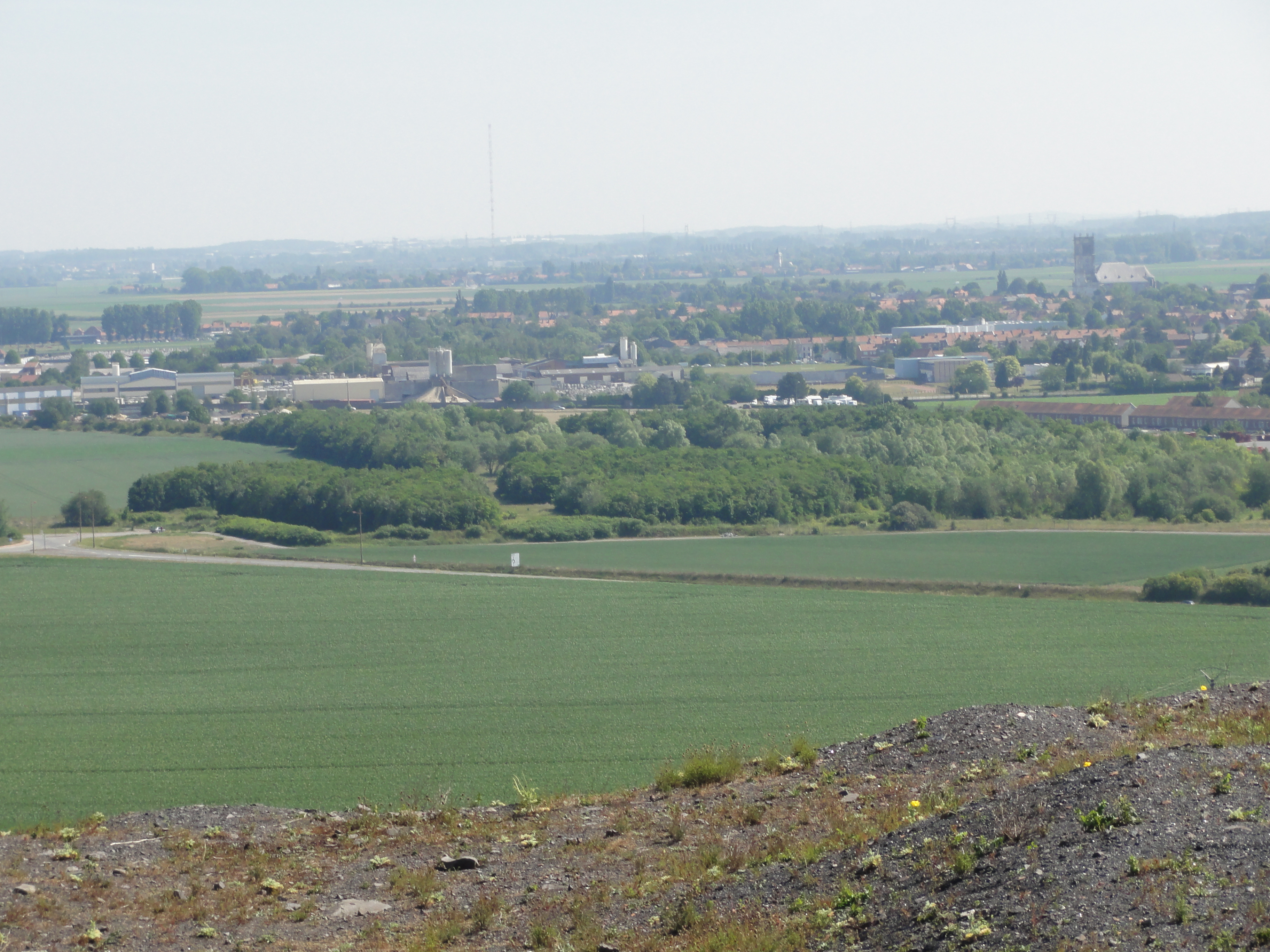 Terril n° 111 dit 14 de Carvin Sud, disparu, Fosse n° 4 de la Compagnie des mines de Carvin, Carvin, Pas-de-Calais, Nord-Pas-de-Calais, France.